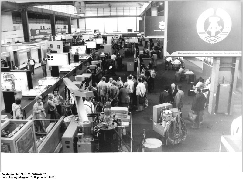 Leipzig, Herbstmesse, Plast- und Elastanverarbeitungsmaschinen ADN-ZB Ludwig-4-9-75-Bau-Leipzig: Herbstmesse 1975-In der Halle 4 stellt die DDR Plast- und Elastverarbeitungsmaschinen aus dem VEB Kombinat Karl-Marx-Stadt vor.